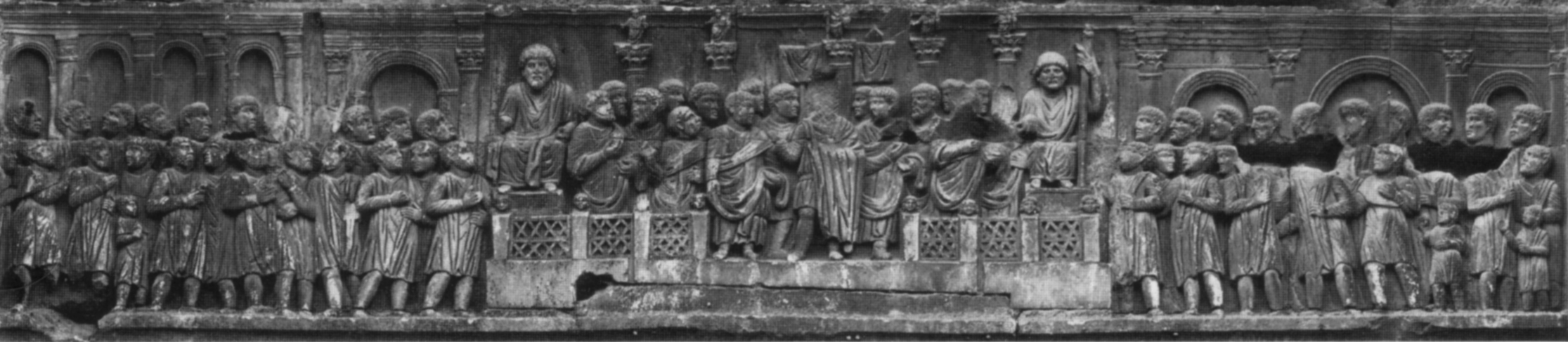 Descrizione: vedi titolo Fonte: Ranuccio Banchi Bandinelli e Mario Torelli, L'arte dell'antichità classica, Etruria-Roma, Utet, Torino 1976. Categoria:Immagini d'arte romana